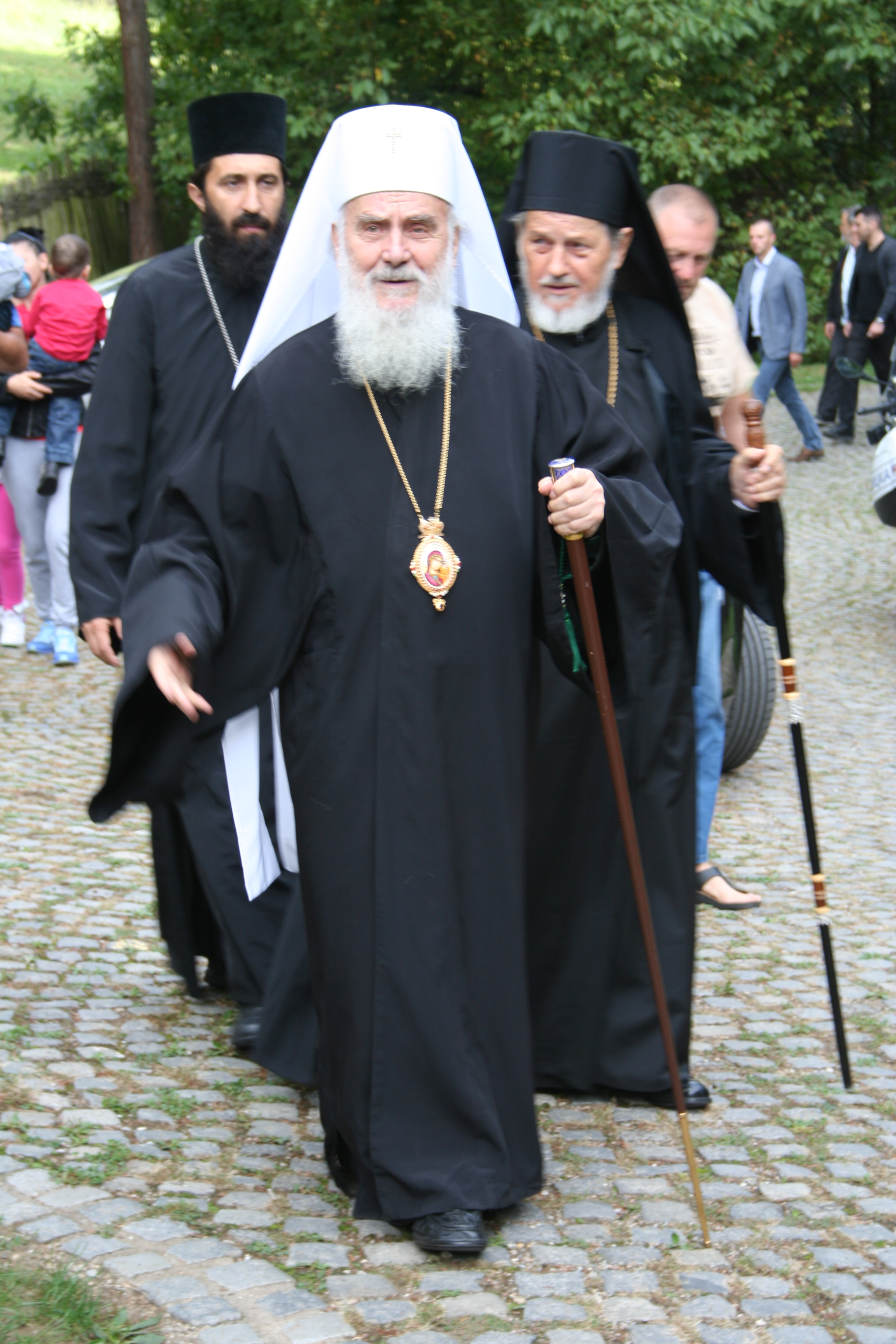 Manastir Tronoša-proslava 700 godina postojanja